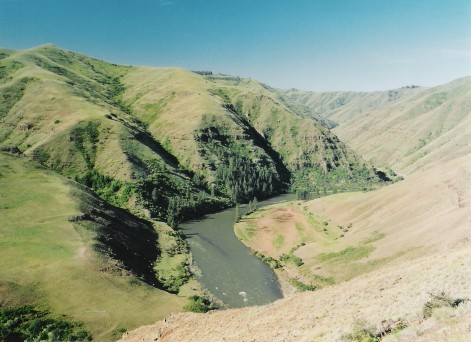 Grande Ronde River